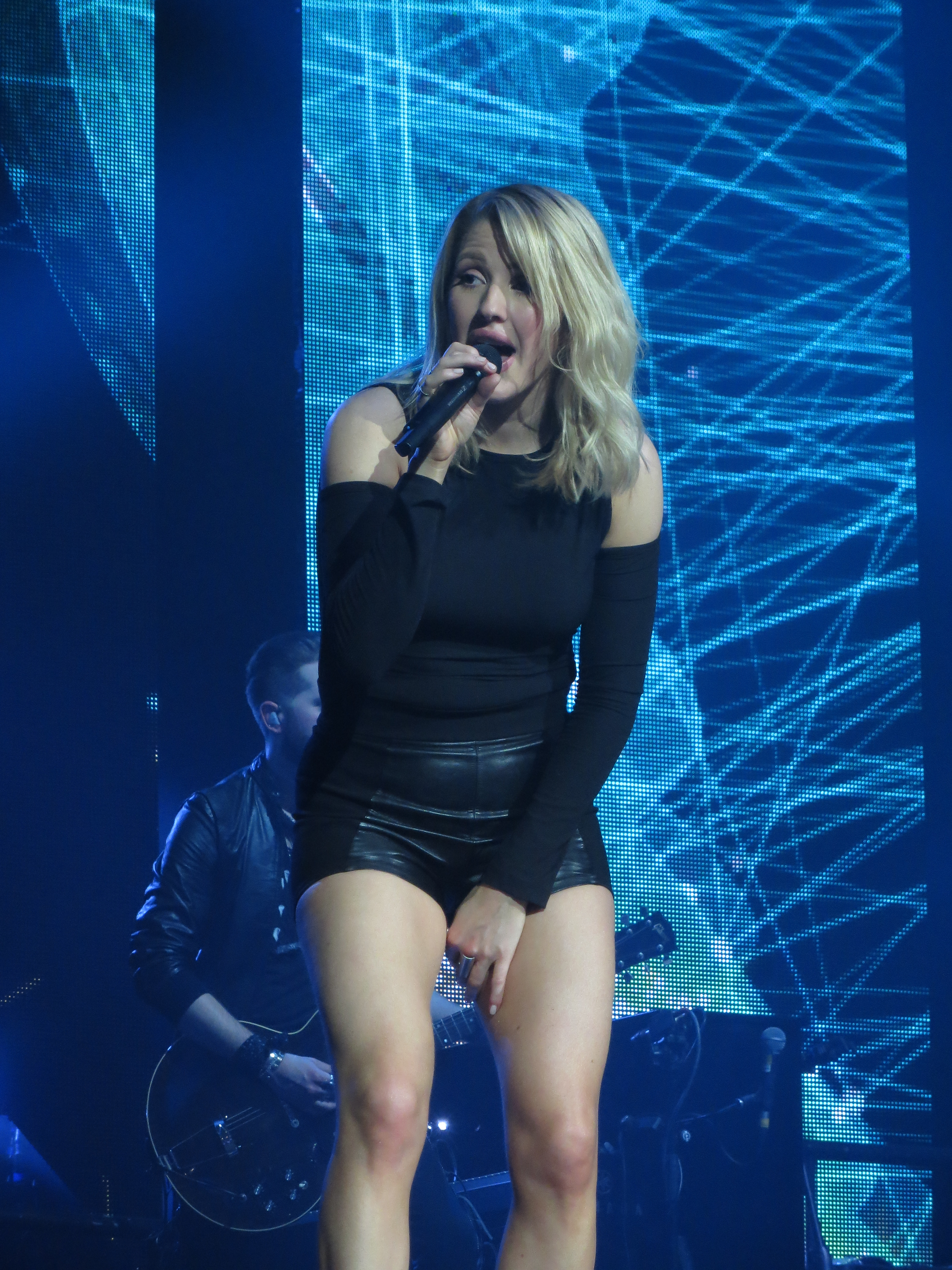 Ellie Goulding 1